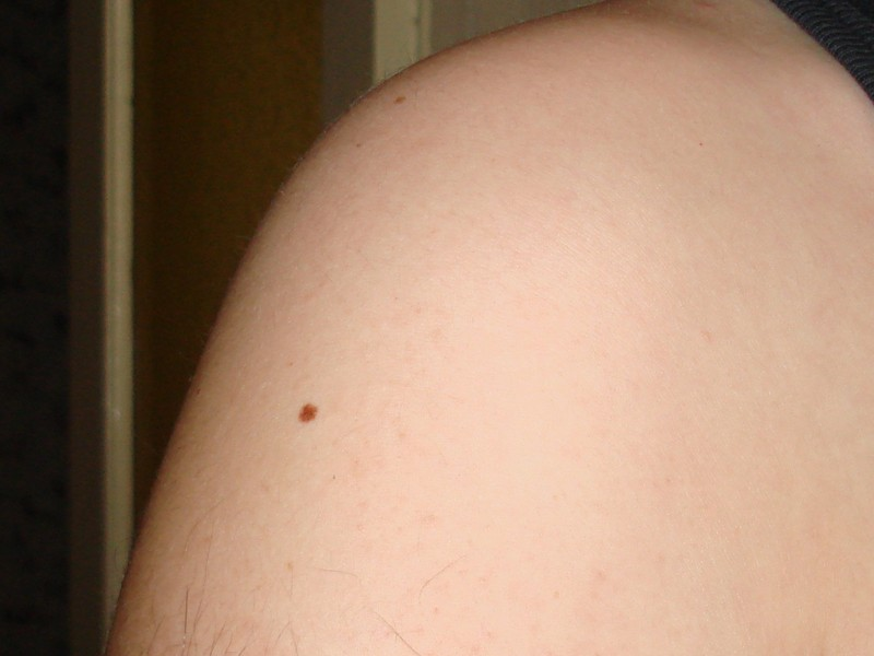 Родинки на плече